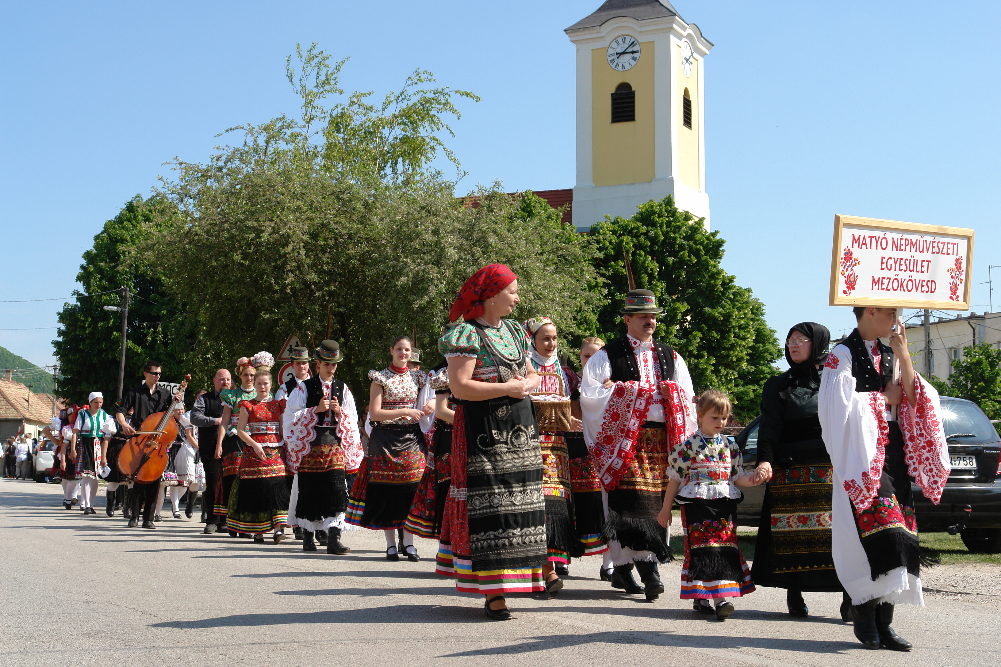 Matyó népviselet. A Szent Adalbert püspök és vértanú Római katolikus templom tornya, Bajna